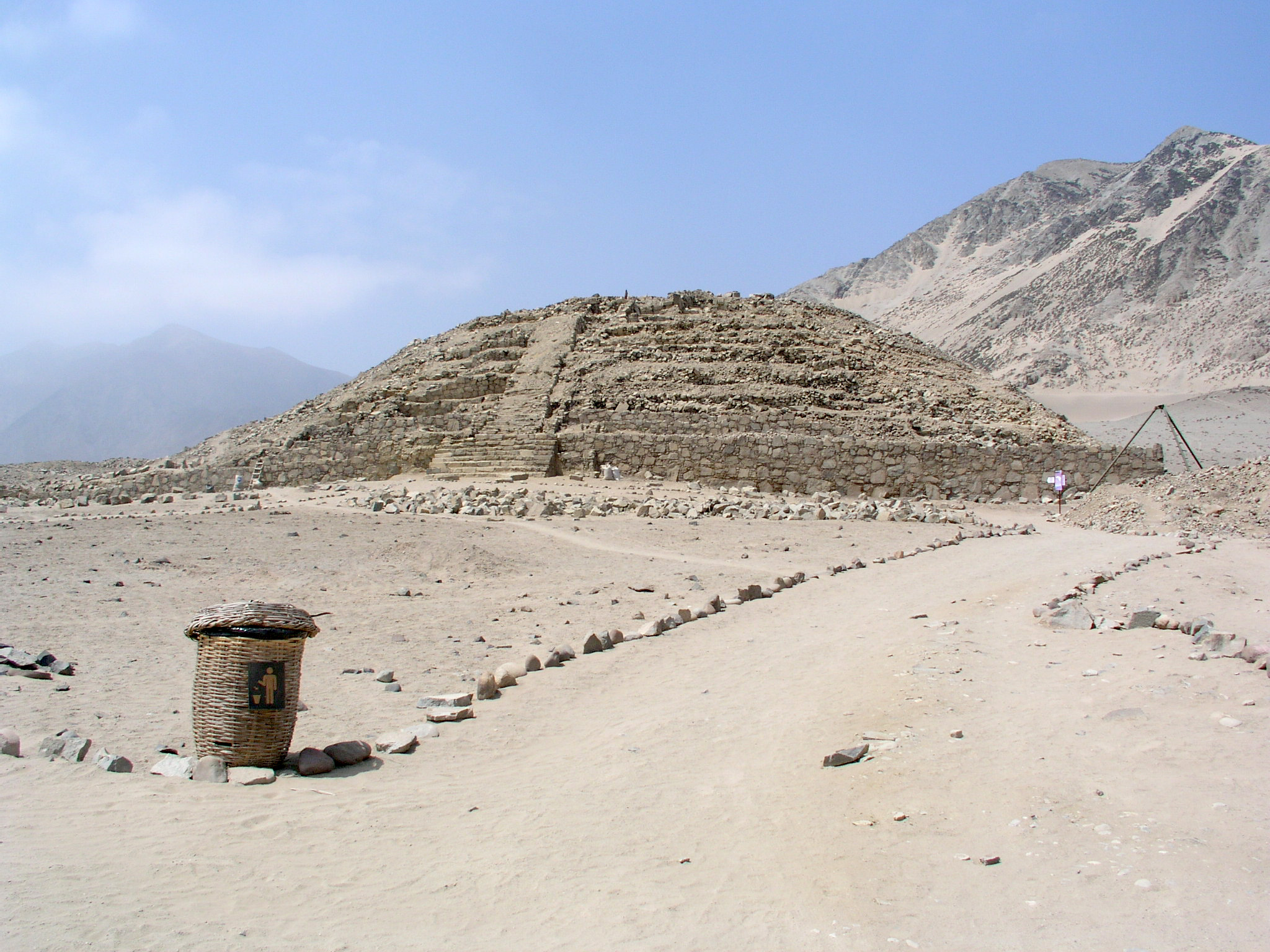 Pirámides en Caral, Valle de Supe, Region Lima, Peru.